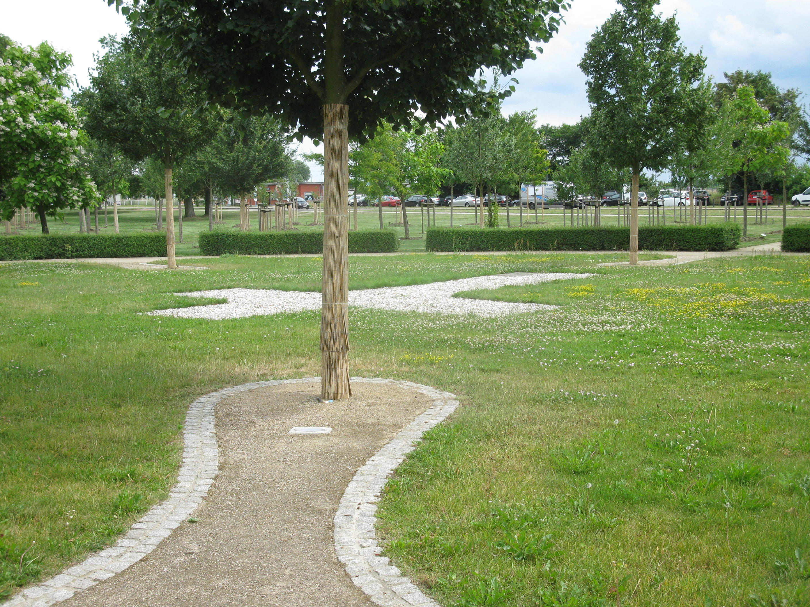 Luthergarten 2014